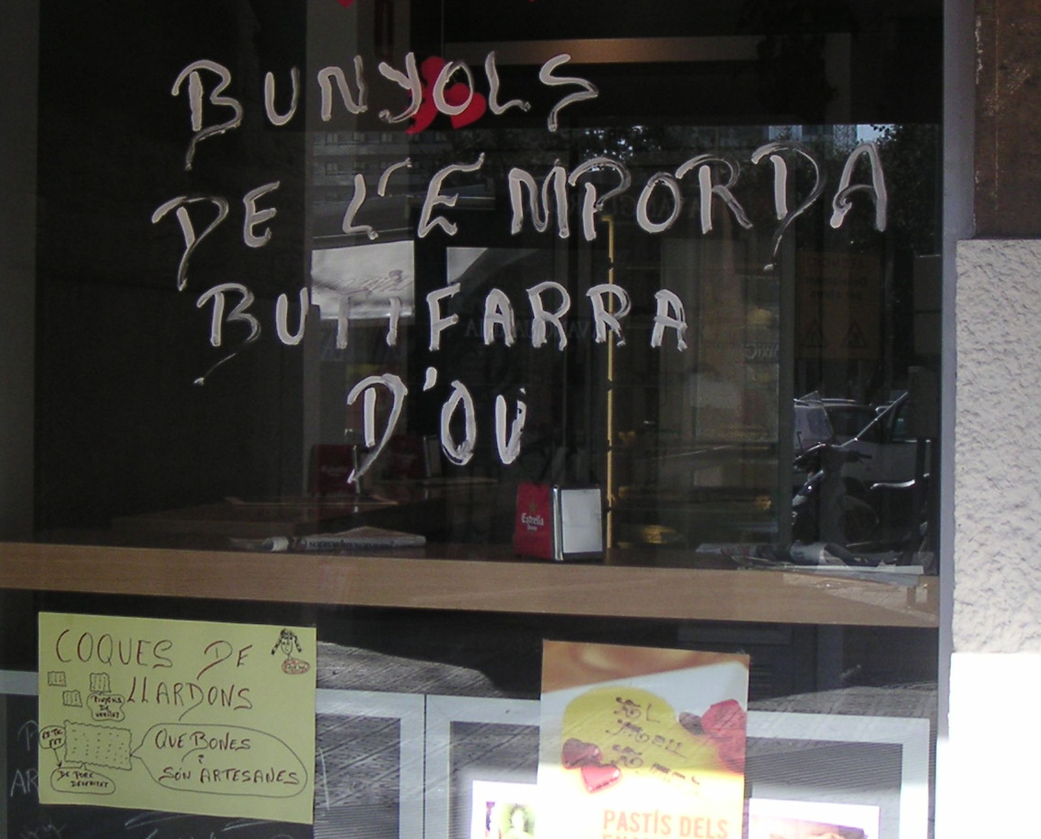 Aparador d'una pastisseria de Barcelona al Carnaval, anunciant que té botifarra d'ou i coques de llardons. Ja tenen també bunyols de Quaresma.